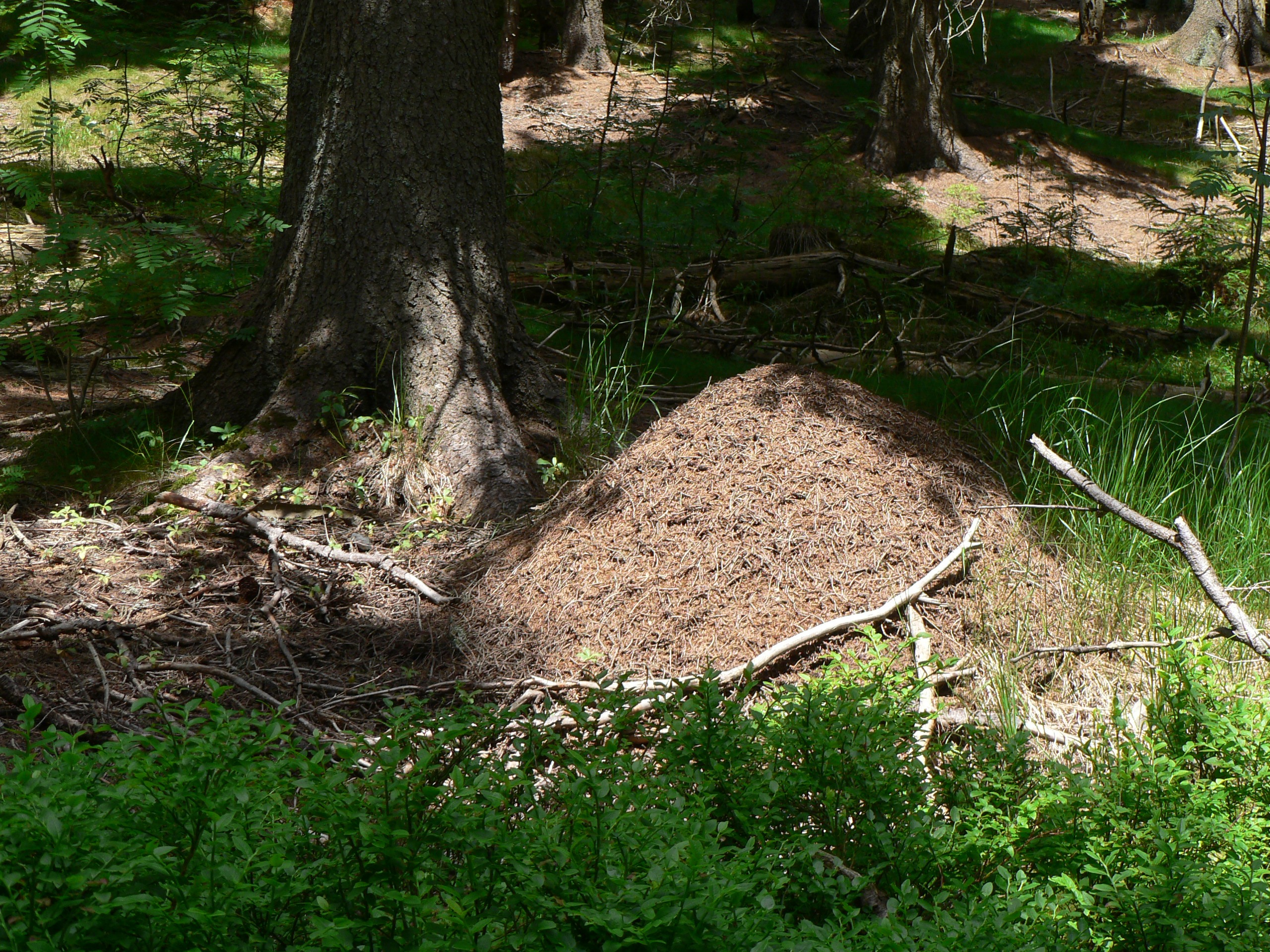 Mraveniště v rezervaci Pod Jelení studánkou v Hrubém Jeseníku